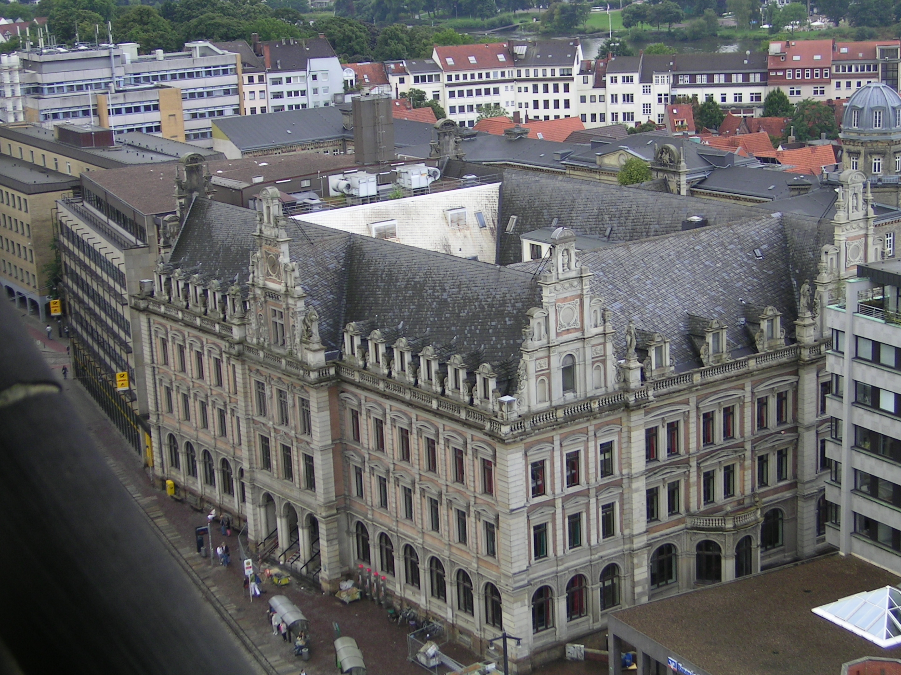 Bremen aerial view „Kaiserliche Oberpostdirektion“ Das abgebildete Objekt ist ein geschütztes Kulturdenkmal in der Freien Hansestadt Bremen, mit der Nr. 0316 beim Landesamt für Denkmalpflege registriert. User:Tarawneh/rami